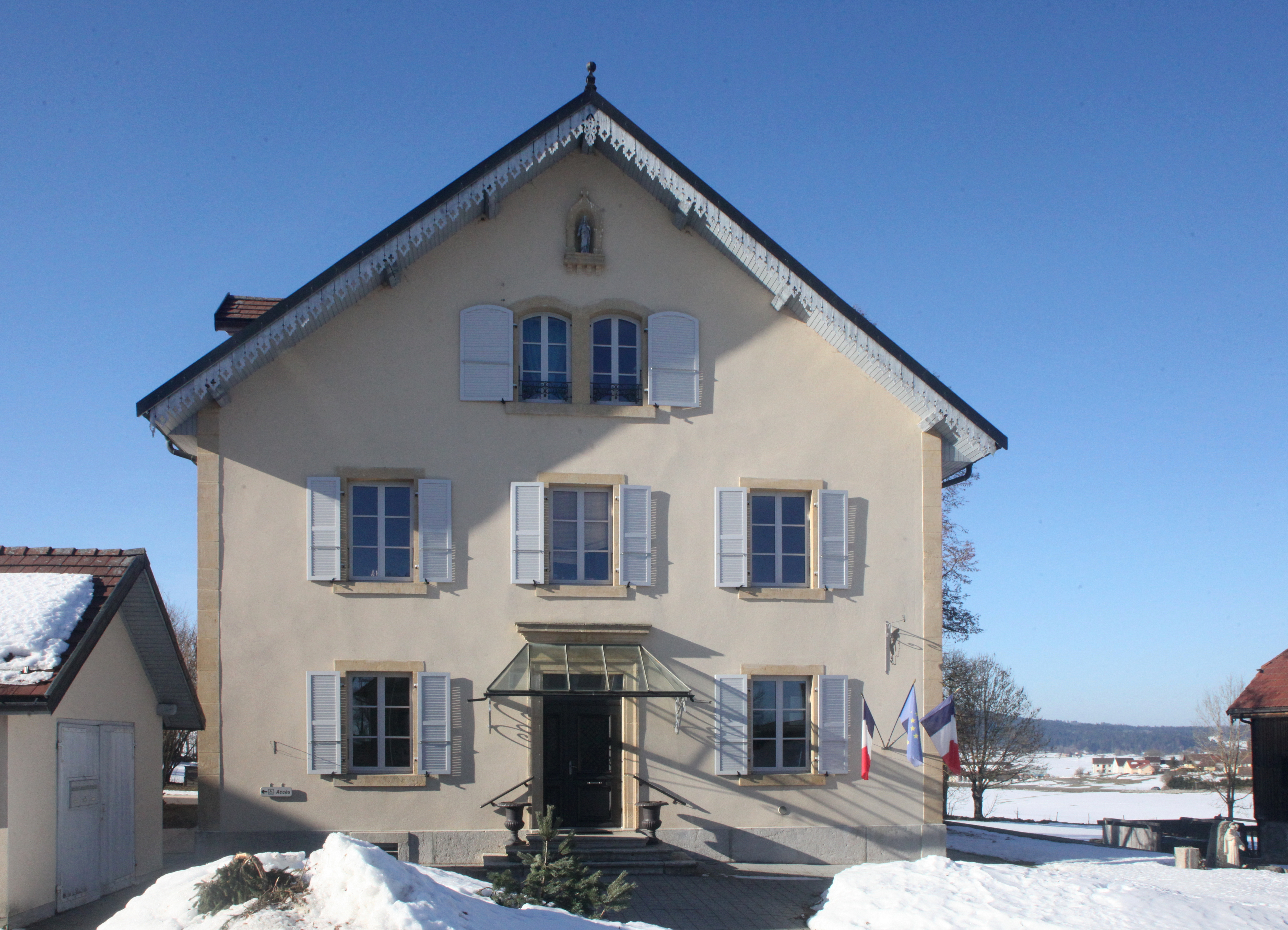 Mairie de Noël-Cerneux.